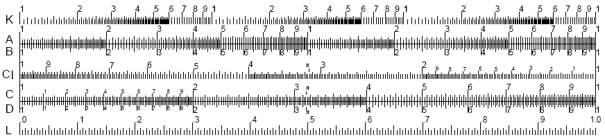 Escalas básicas de uma régua de cálculos (A, B, C, CI, D, K e L)